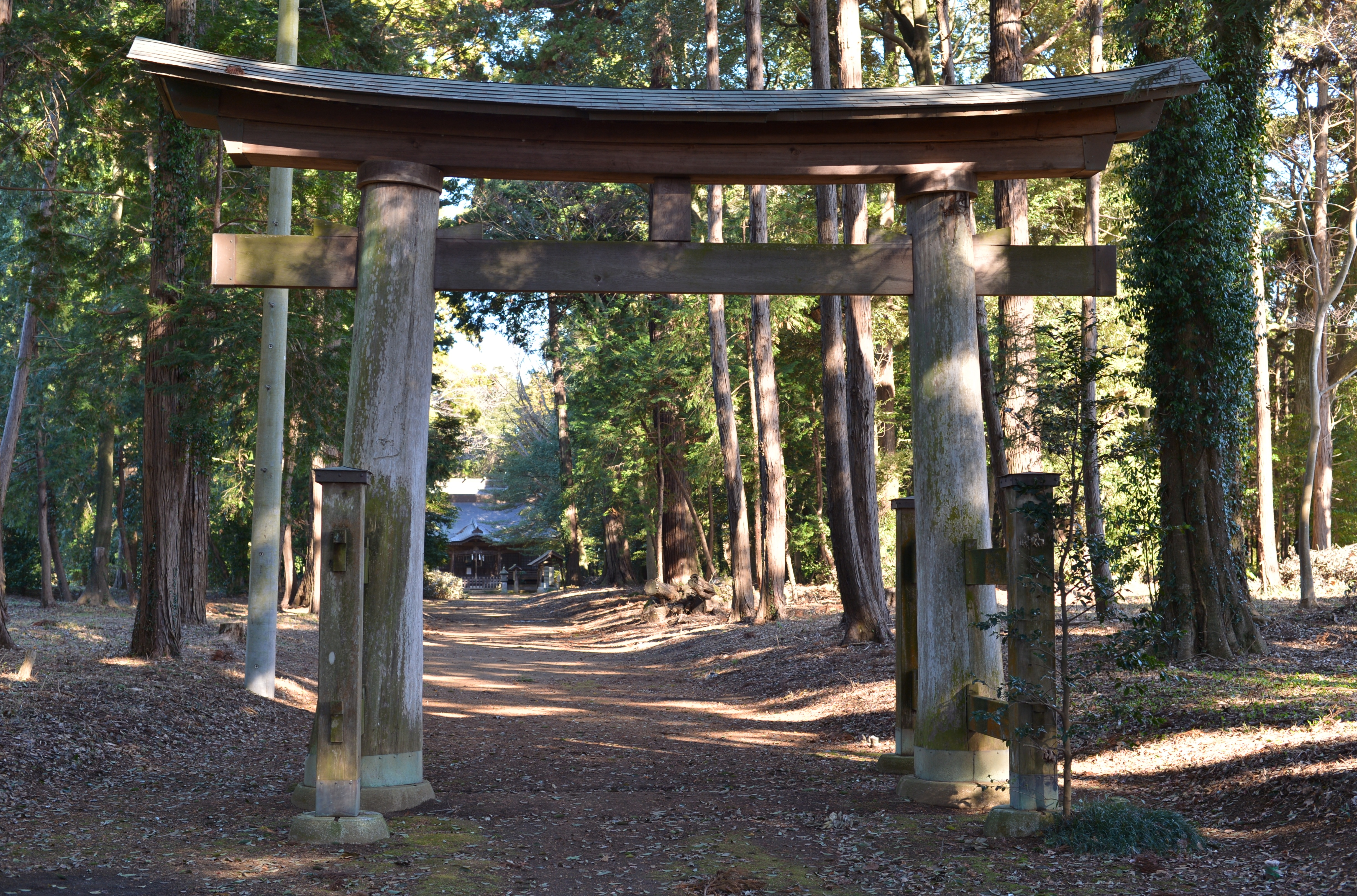 楯縫神社の二の鳥居（茨城県稲敷郡美浦村）。茨城県稲敷郡美浦村郷中。